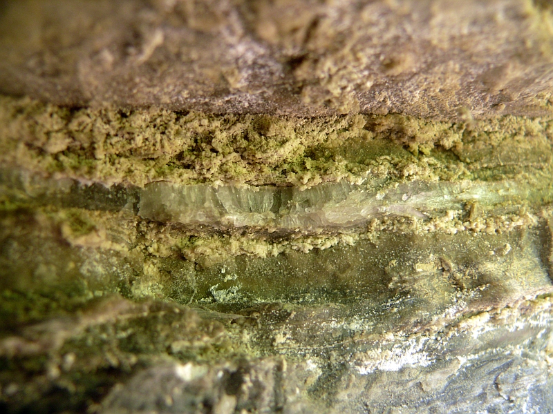 Detail Untere Sulfatschichten, Mittlerer Muschelkalk, Heilbronn-Formation, Löwenburg bei Braunsbach-Geislingen